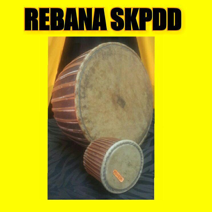 Rebana